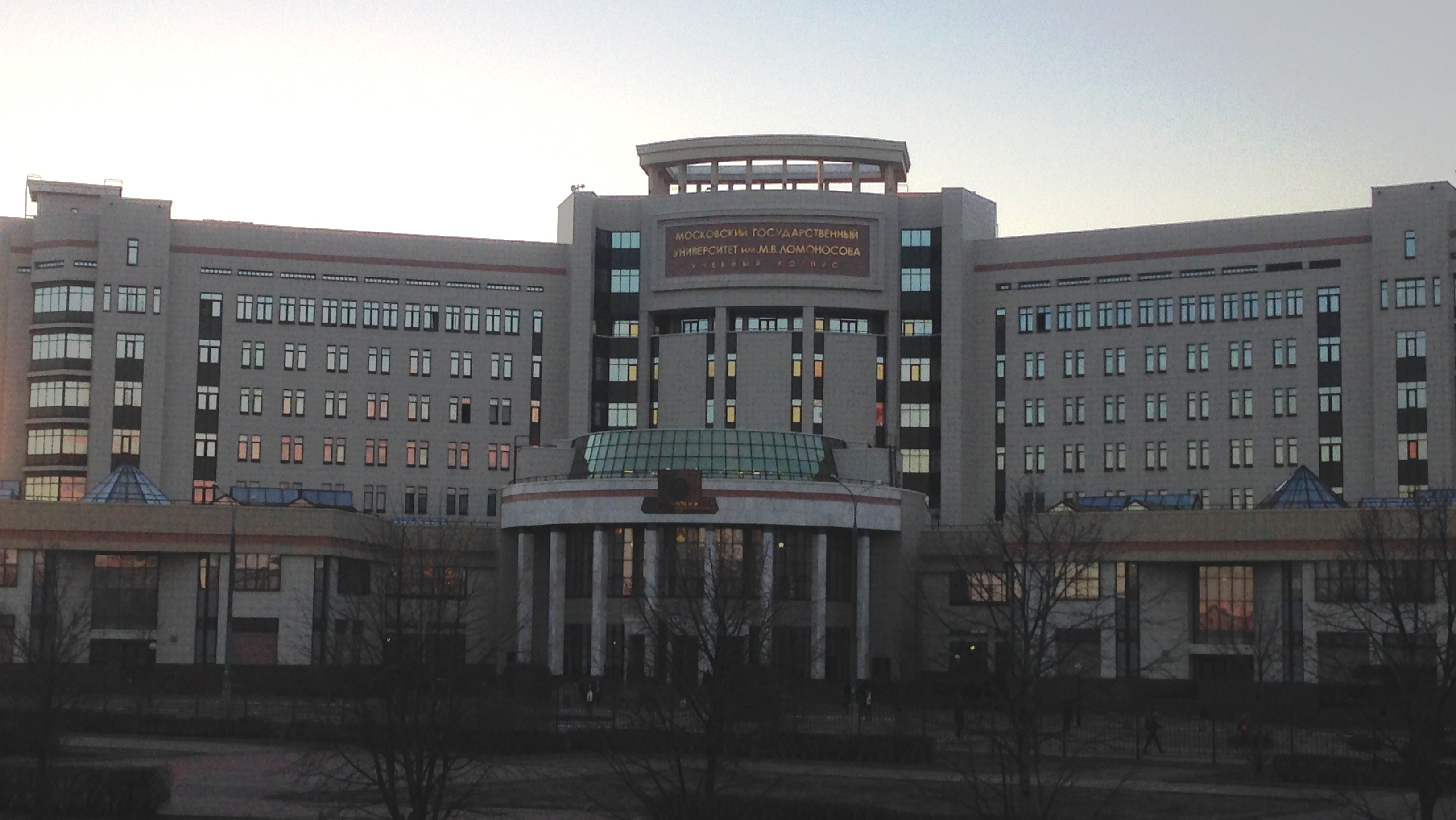 Шуваловский корпус МГУ - новая территория.